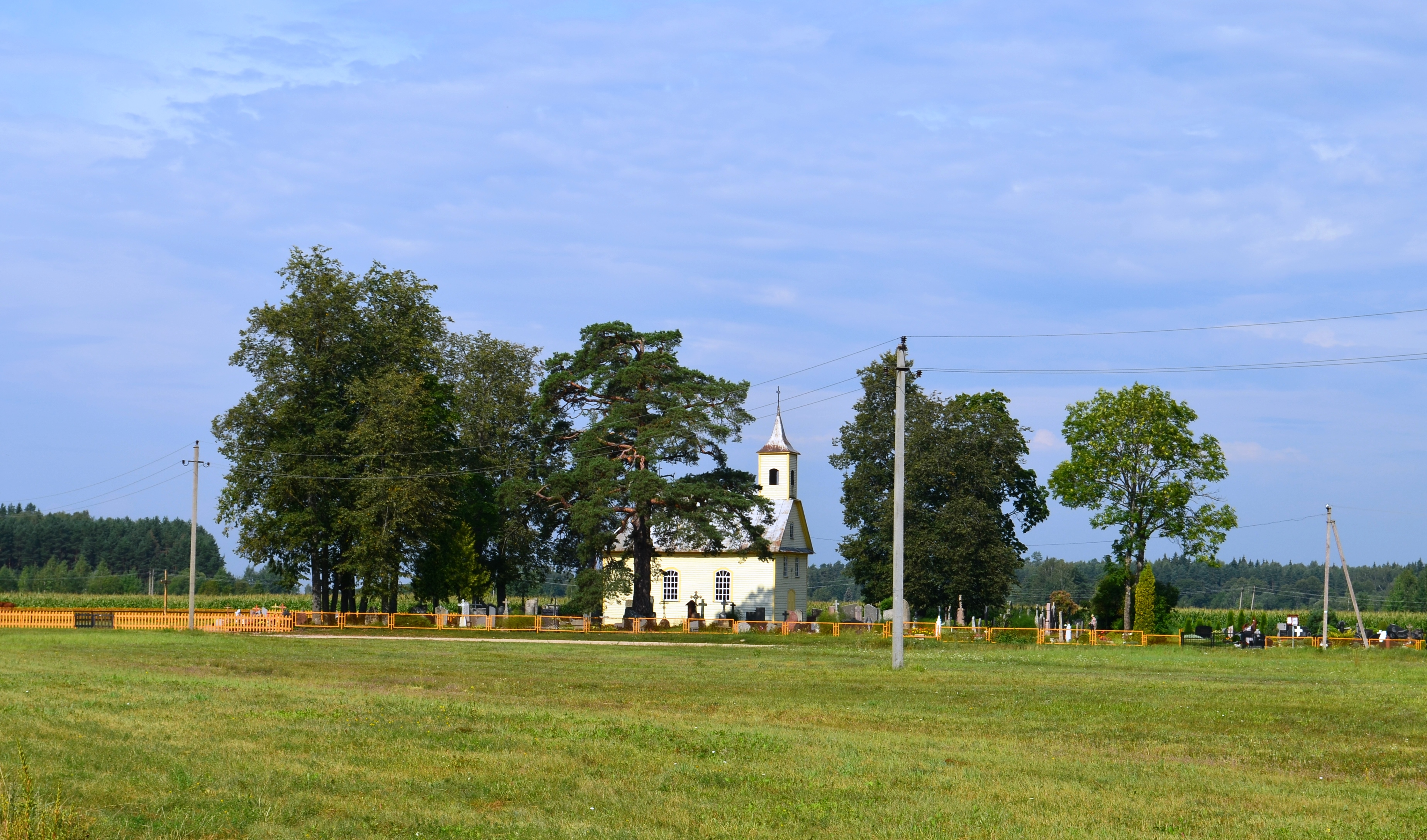 Koplyčia, Naujikai, Panevėžio r.